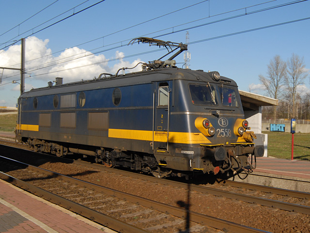 Locomotief 2558 rijdt door het station Antwerpen-Noorderdokken